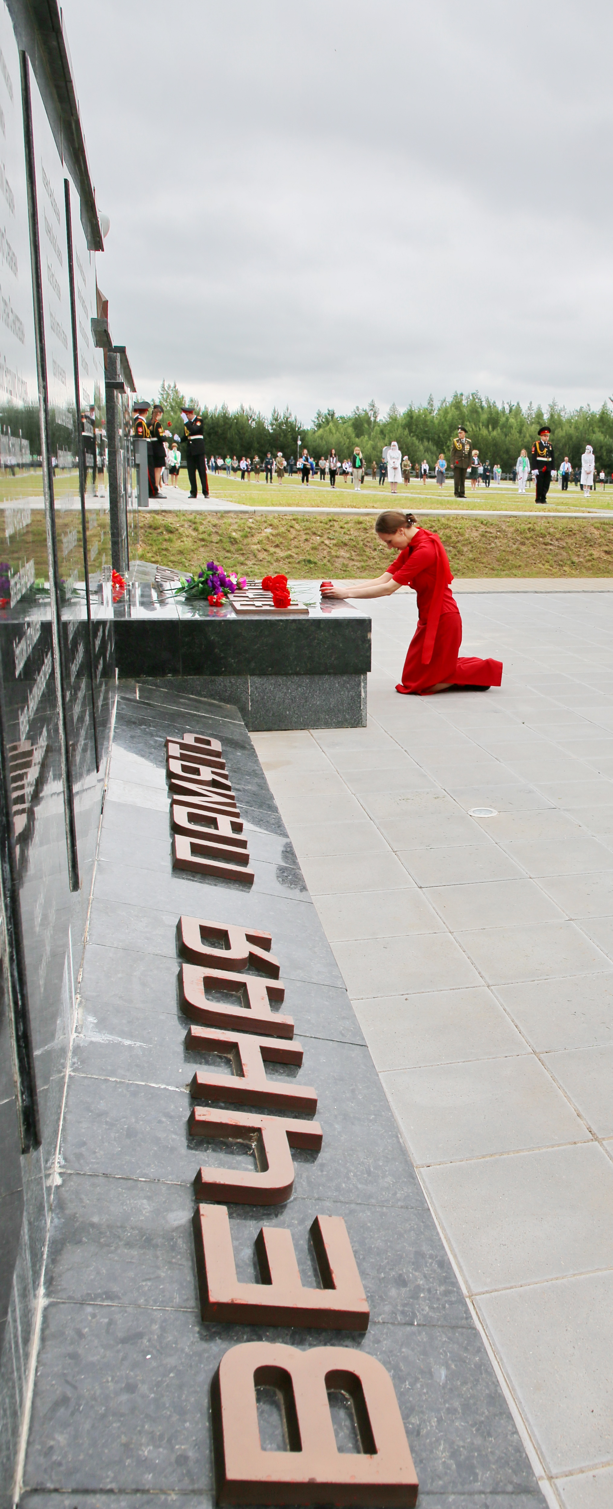 Вечная память 22 июня